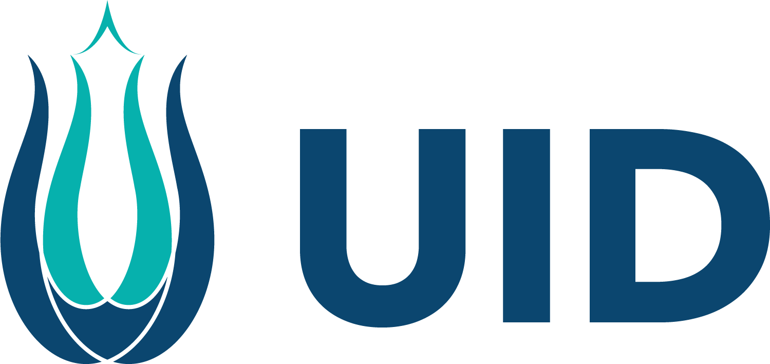 Das neue Logo der UID.